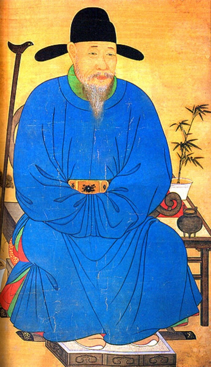 문효공과정경부인영정(文孝公과貞敬夫人影幀), 전라북도 유형문화재 제81호中文（香港）: 領議政河演夫婦影幀